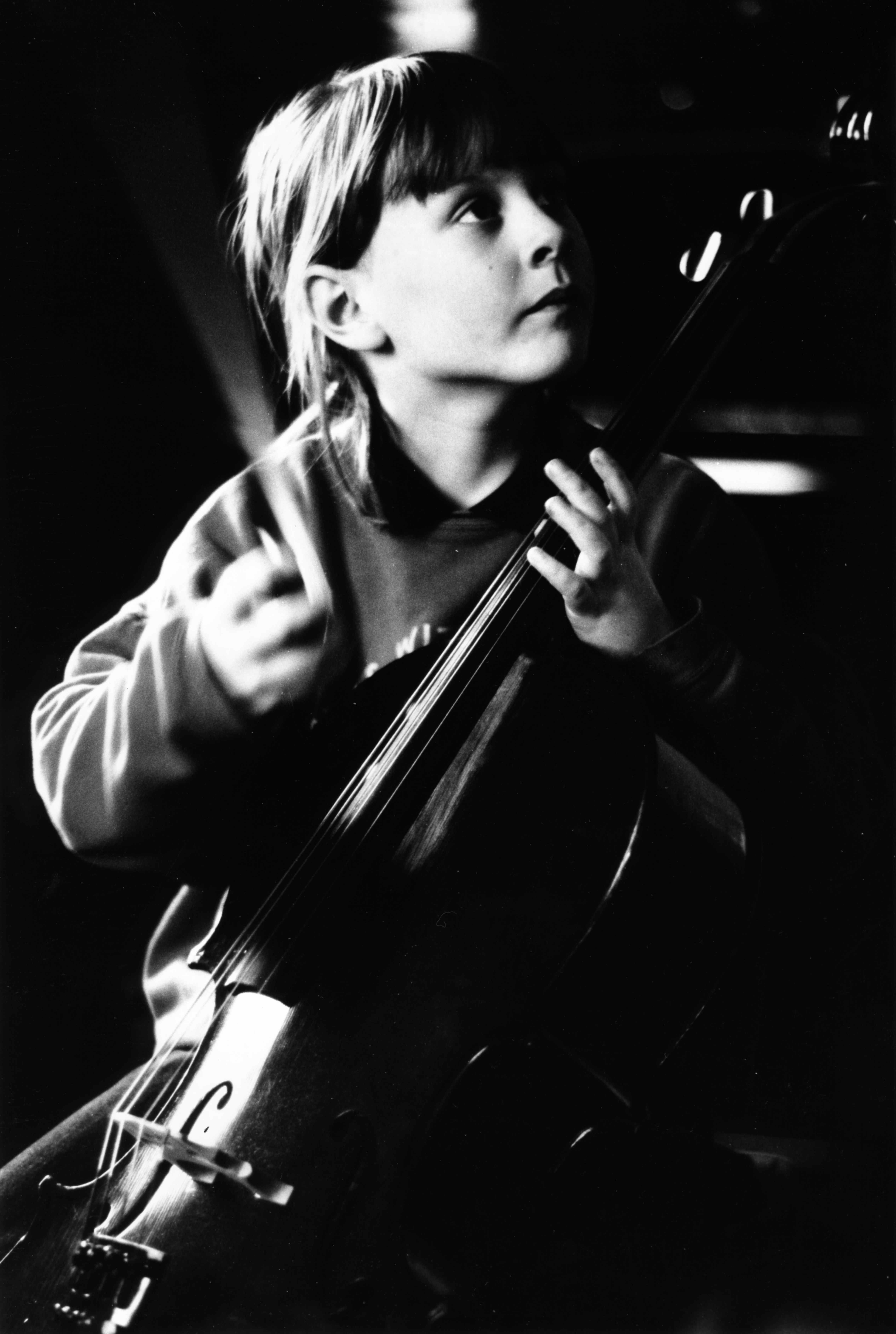 Cellist